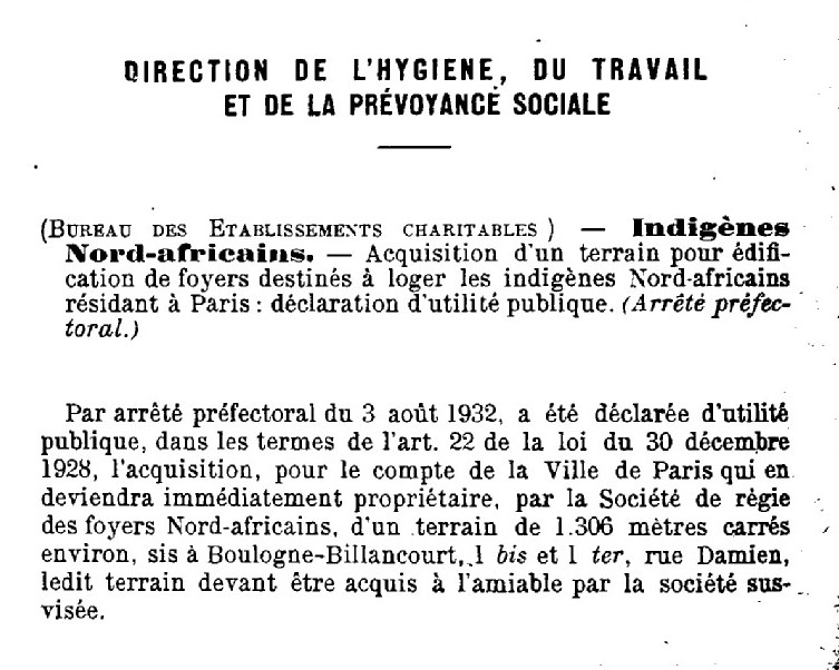 Article du recueil des actes administratifs de la Préfecture du département de la Seine portant sur l'achat d'un terrain par le Service des affaires indigènes nord-africaines pour la construction d'un foye